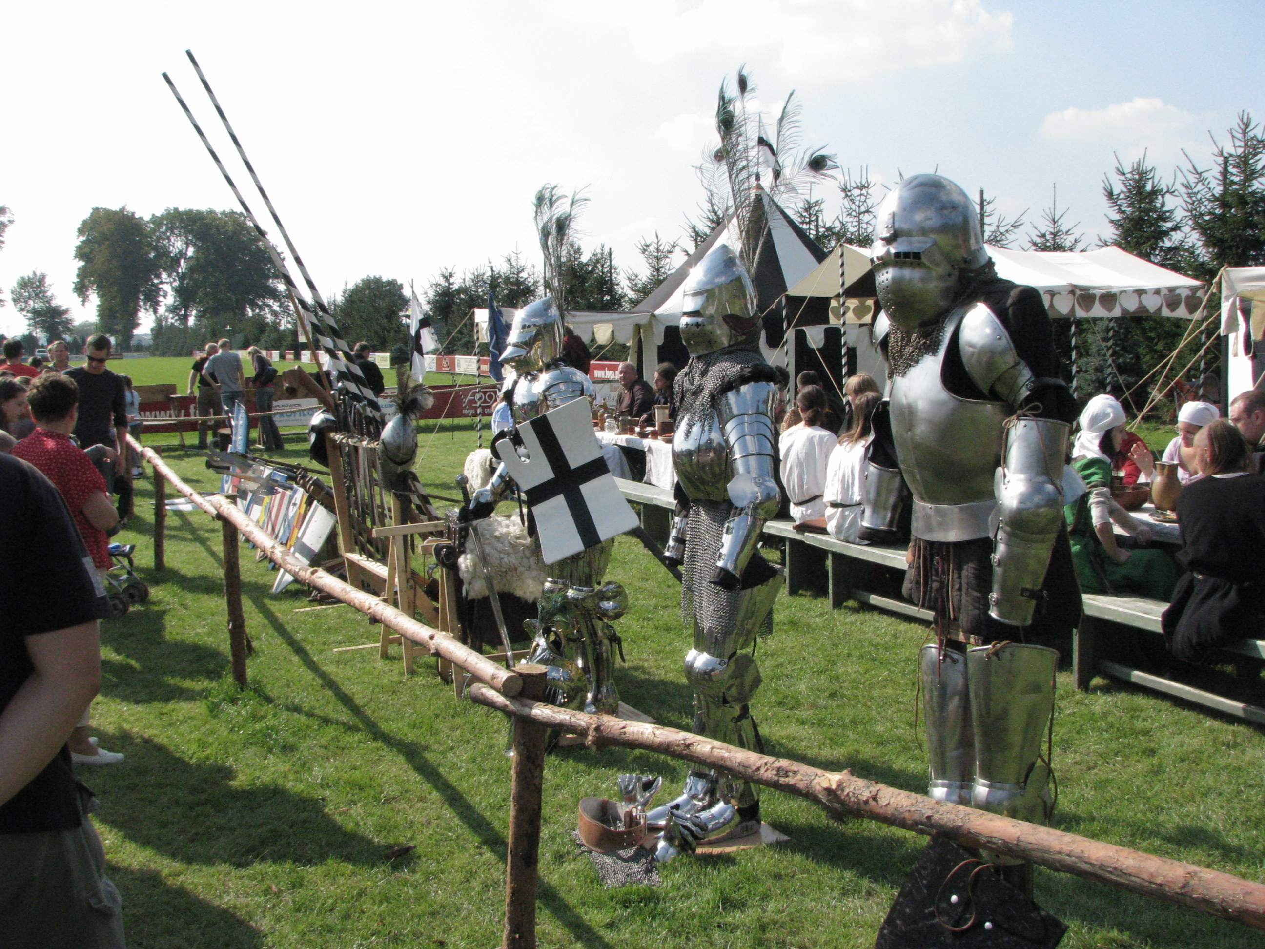 Repliki zbroi średniowiecznych